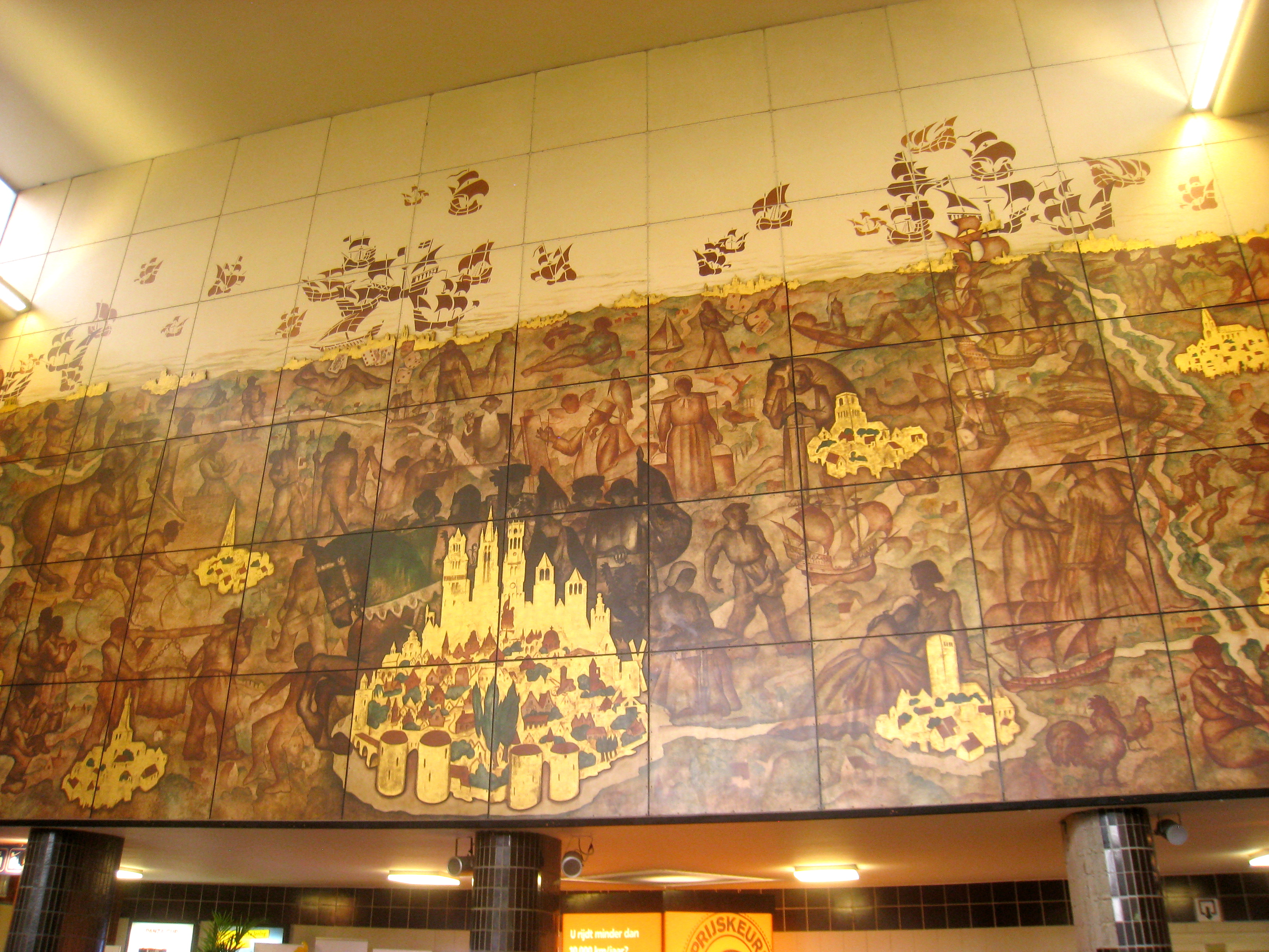 Bruges (Brugge) miscellany, Belgium.